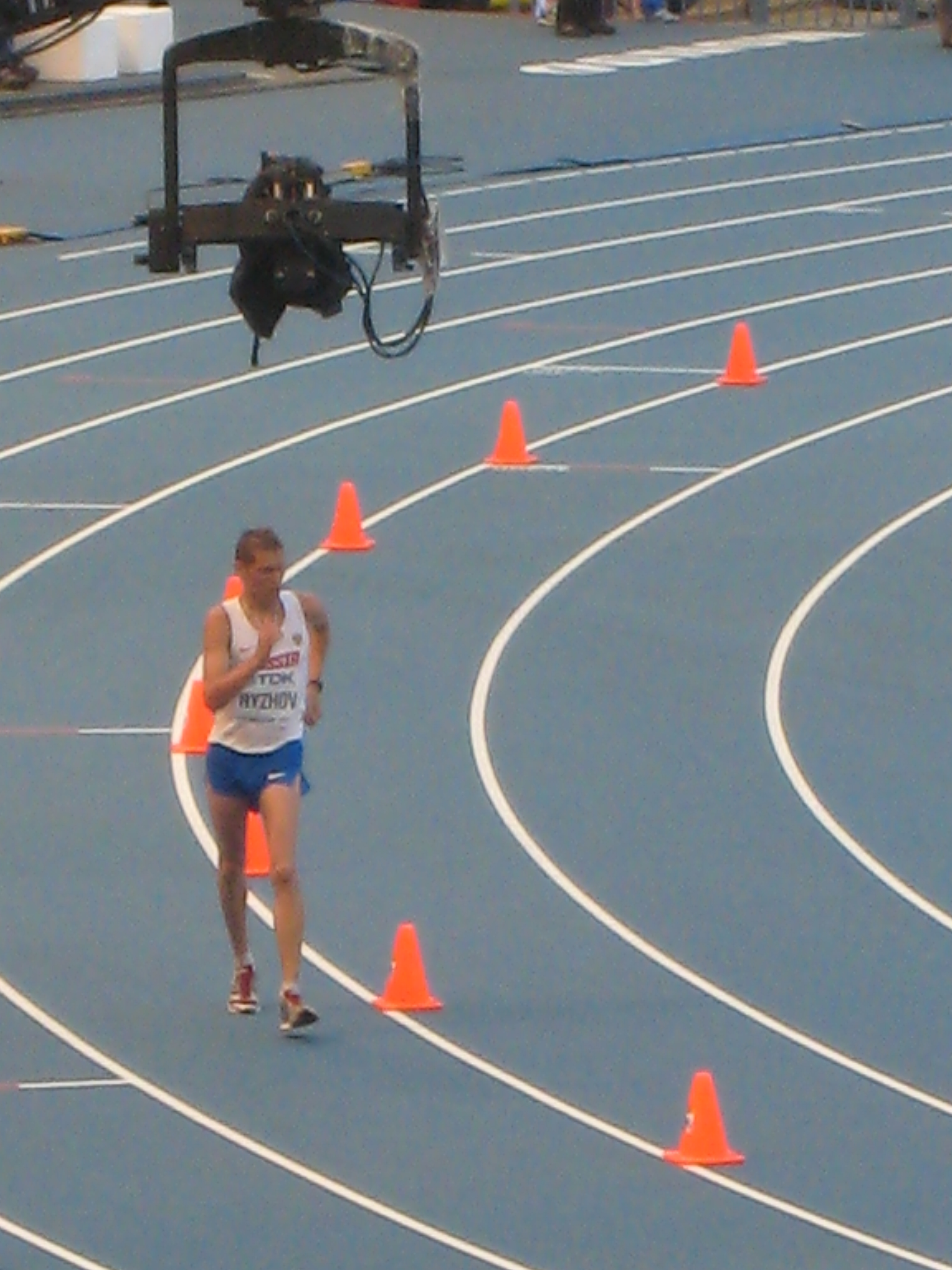 Чемпионат мира по лёгкой атлетике 2013. Ходьба 50 км. Последний круг перед финишем вице-чемпиона Михаила Рыжова.